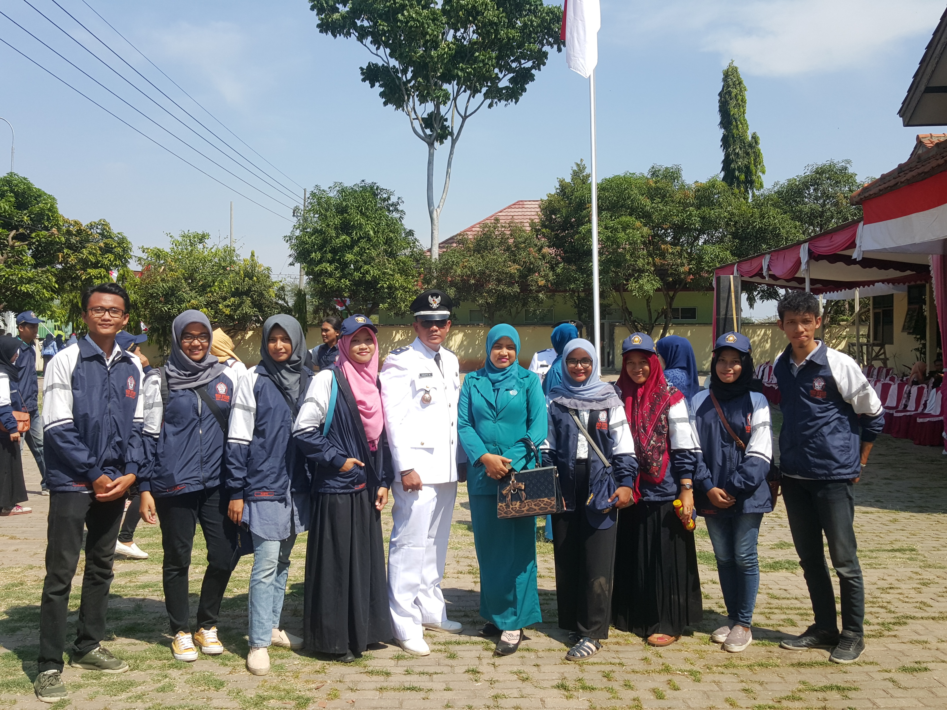 Kepala Desa Mejasem bersama Tim II KKN Undip